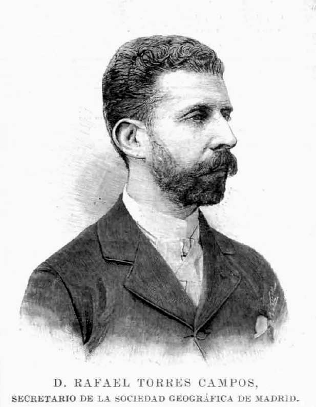 Rafael Torres Campos, imagen aparecida en la revista la Ilustración Española y Americana el 22 de diciembre de 1892